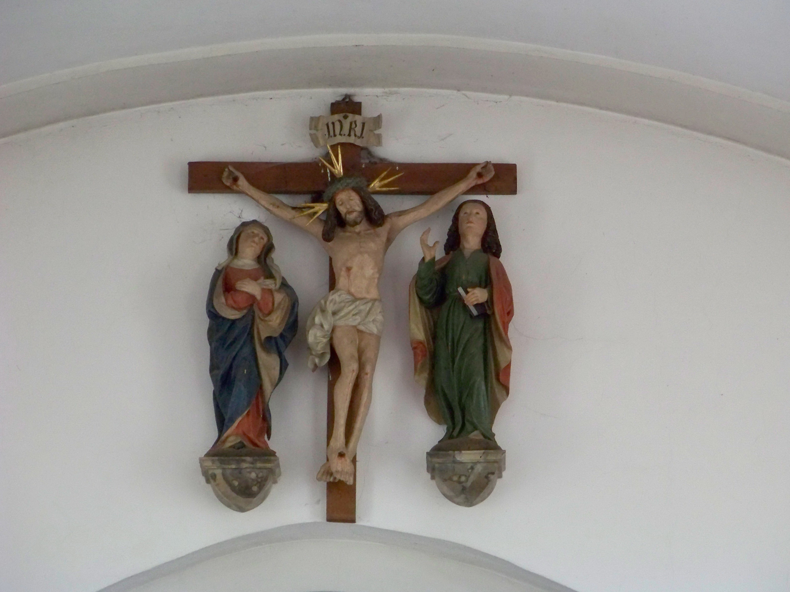 Rottenburg an der Laaber. Inkofen, Haus Nr. 117. Katholische Pfarrkirche Mariä Reinigung mit Kapelle. Saalkirche aus der zweiten Hälfte 15. Jahrhunderts. Barocker Ausbau in der Mitte des 17. Jahrhunderts. Über dem Chorbogen ist eine Kreuzigungsgruppe zusammengestellt. Das Kruzifix stammt aus der Mitte des 16. Jahrhunderts. Die Assistenzfiguren Maria und Johannes entstanden um 1500.